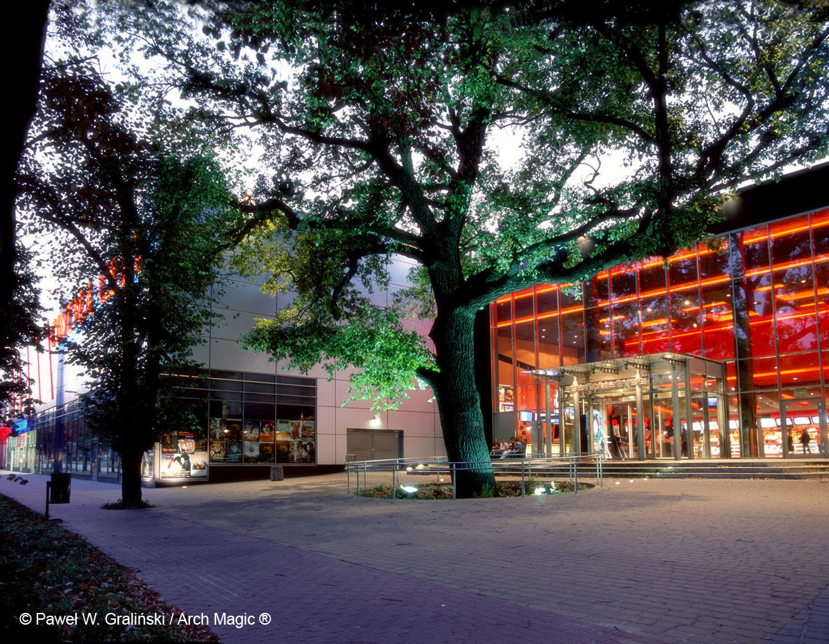 wejscie do Cinema City Toruń